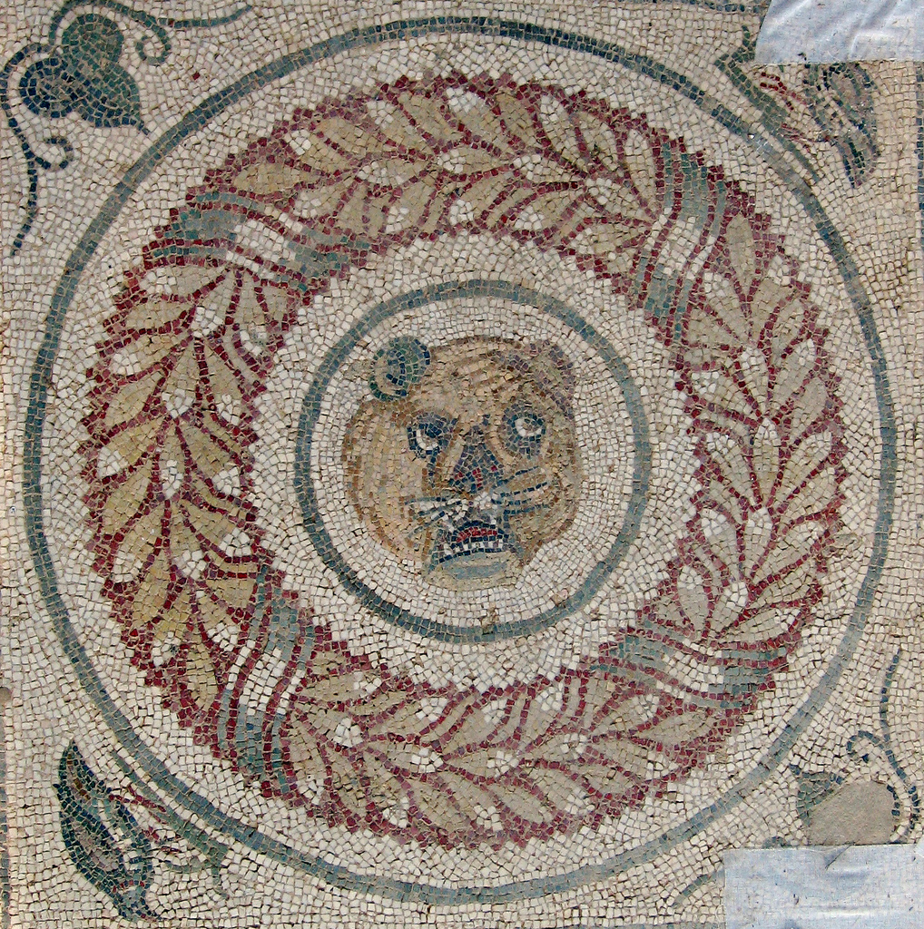 Villa Romana del Casale, Piazza Armerina, Sicily/Sicilia, Italy/Italien